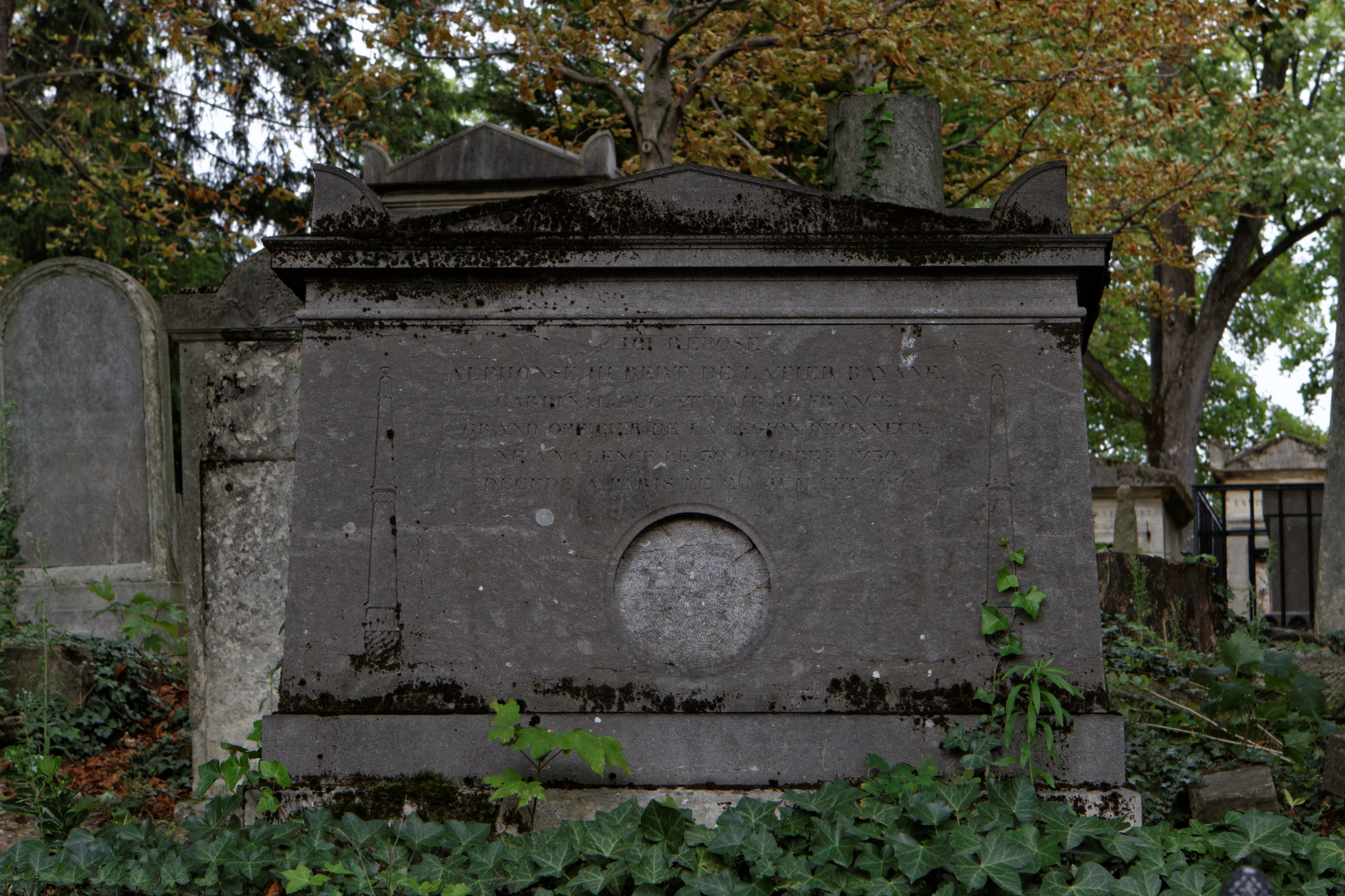 Monument rectangulaire qui était à l'origine ornée d'un médaillon.